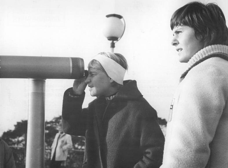 Berlin, Müggelturm, Eisschnellläuferinnen, Ashworth, Smith Zentralbild Studré 22.2.1964 Amerikanische Eisschnellläuferinnen starten in Berlin Jeanne Ashworth (am Fernrohr) und Janice Smith (beide USA) betrachten voller interesse die Umgebung des Müggelturmes. Die amerikanischen Olympia-Teilnehmerinnen unternahmen vor ihrem Start bei den internationalen Eisschnelllauf-Wettbewerben der Frauen im Berliner Dynamo-Sportforum (22. und 23.2.1964)einen kleinen Ausflug zum Müggelturm.